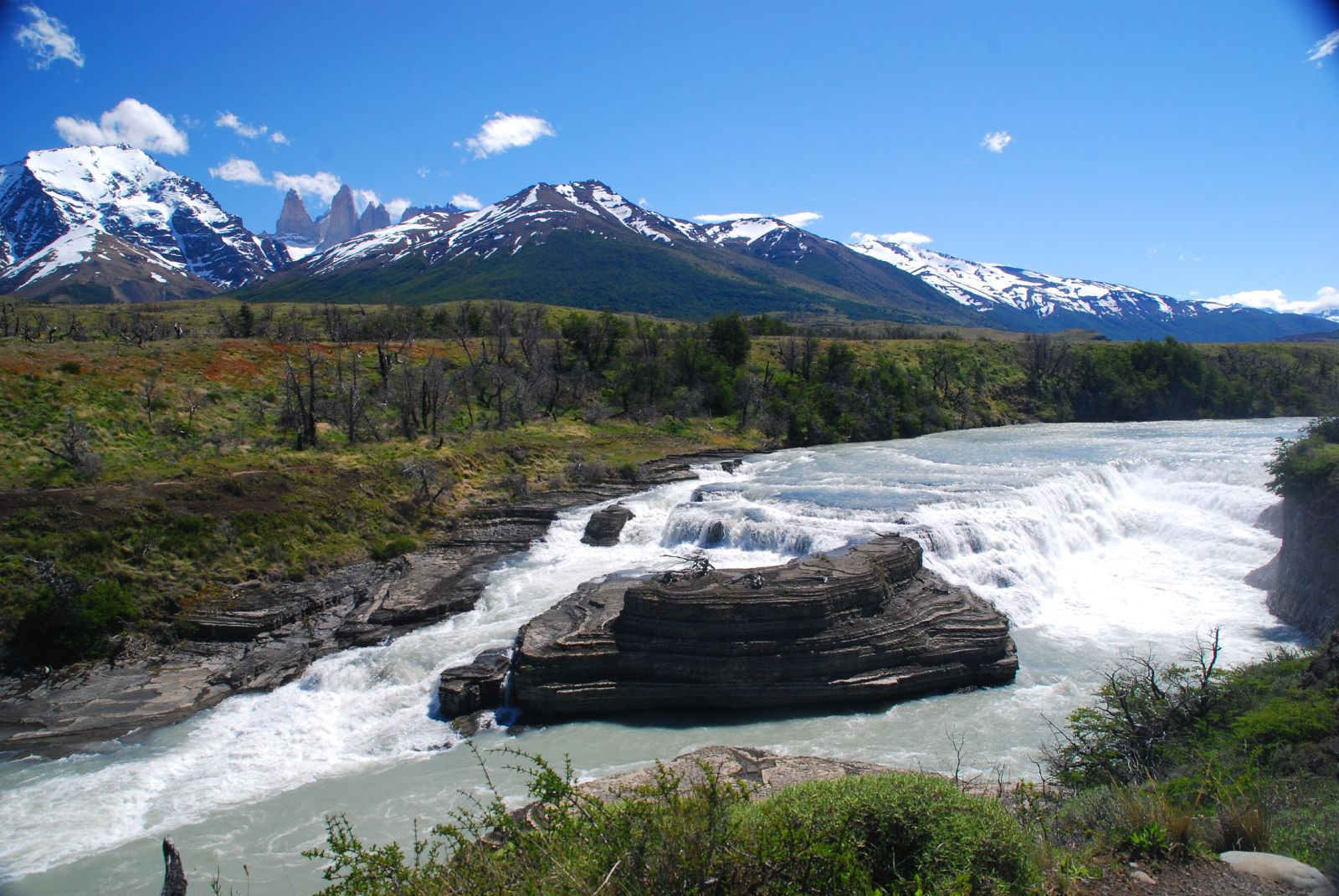 Paine River Cascade.